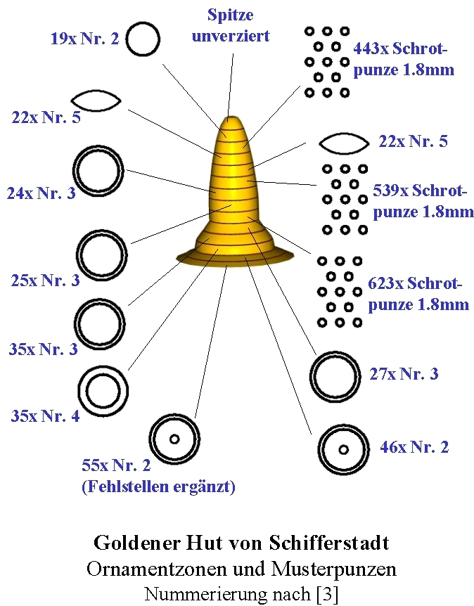 Ornamentzonen und in den Zonen verwendete Stempelmuster am Goldenen Hut von Schifferstadt